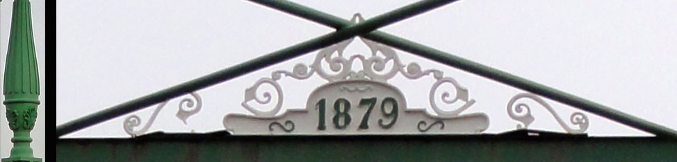 Details van Zuidema's klap brug over het Hunsingokanaal tussen Zoutkamp en Ulrum ter hoogte van Niekerk (de Marne)